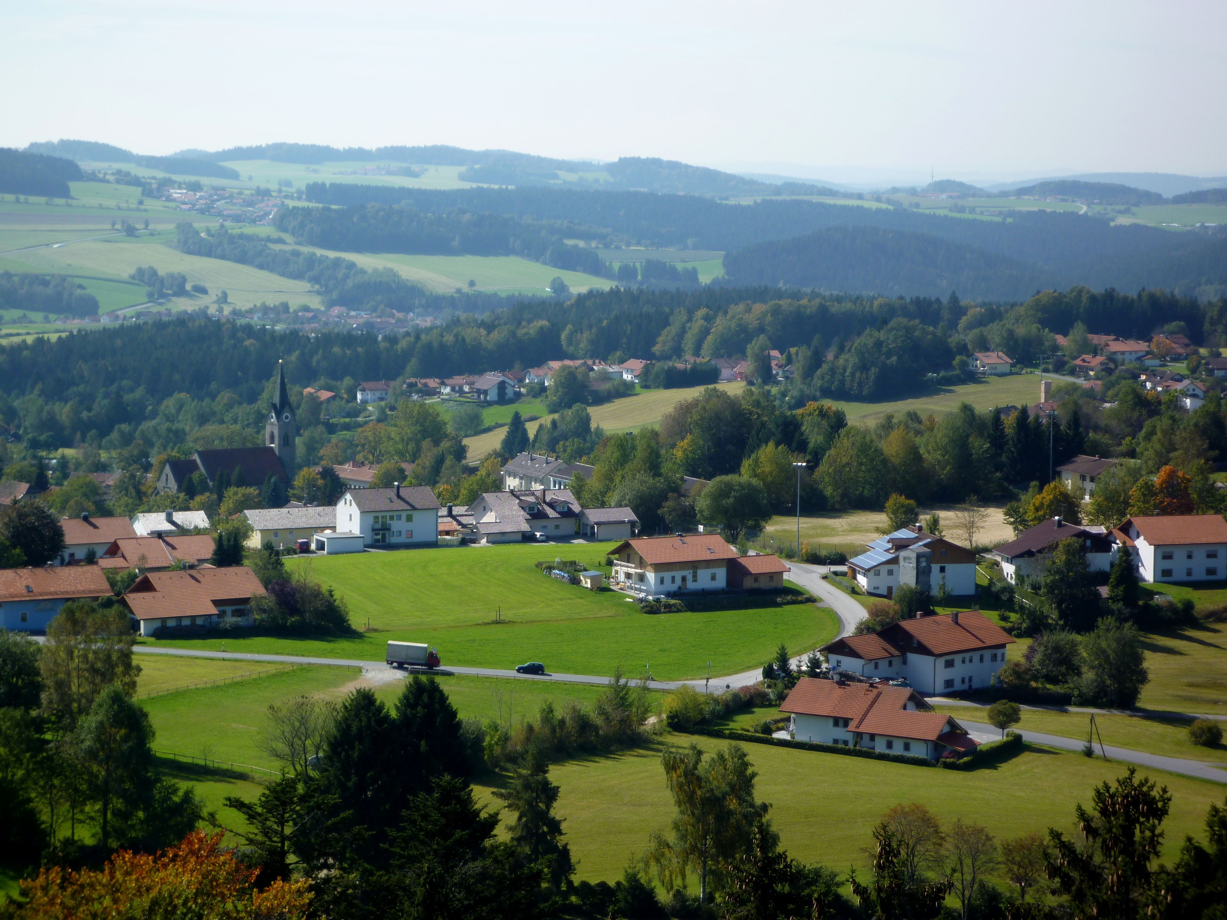 Neuschönau - Sicht vom Baumturm